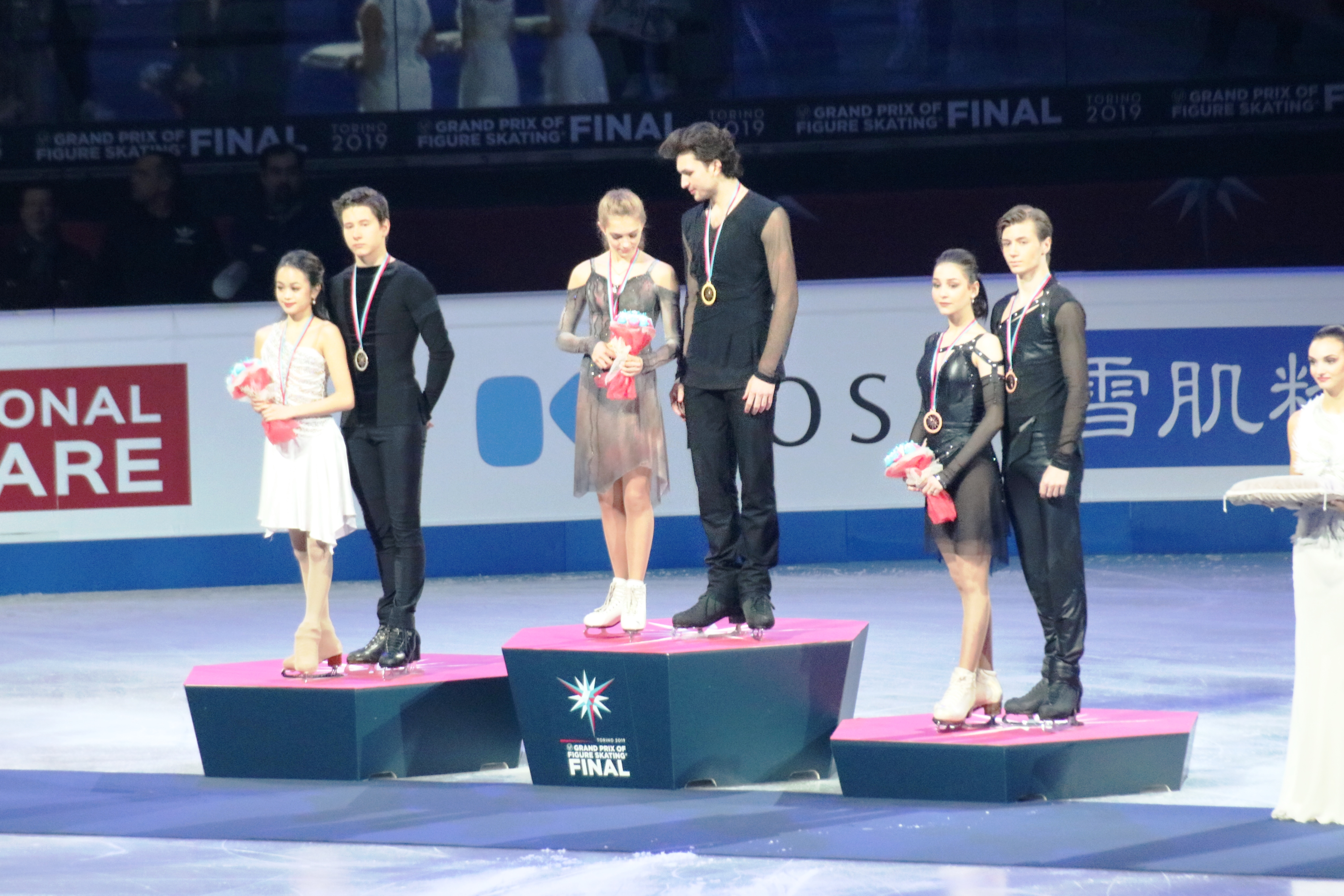 Церемония награждения в танцах на льду на финале юниорского Гран-при 2019-2020